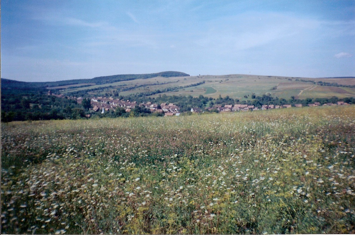 Fotogafia reprezintă satul Bărcut, județul Brașov, vedere de pe deal. Este executată de mine și nu intră sub incidența drepturilor de autor. O ofer spre publicare petru ilustrarea articolului Satul Bărcut, județul Brașov.--OME 12 mai 2007 21:51 (EEST)